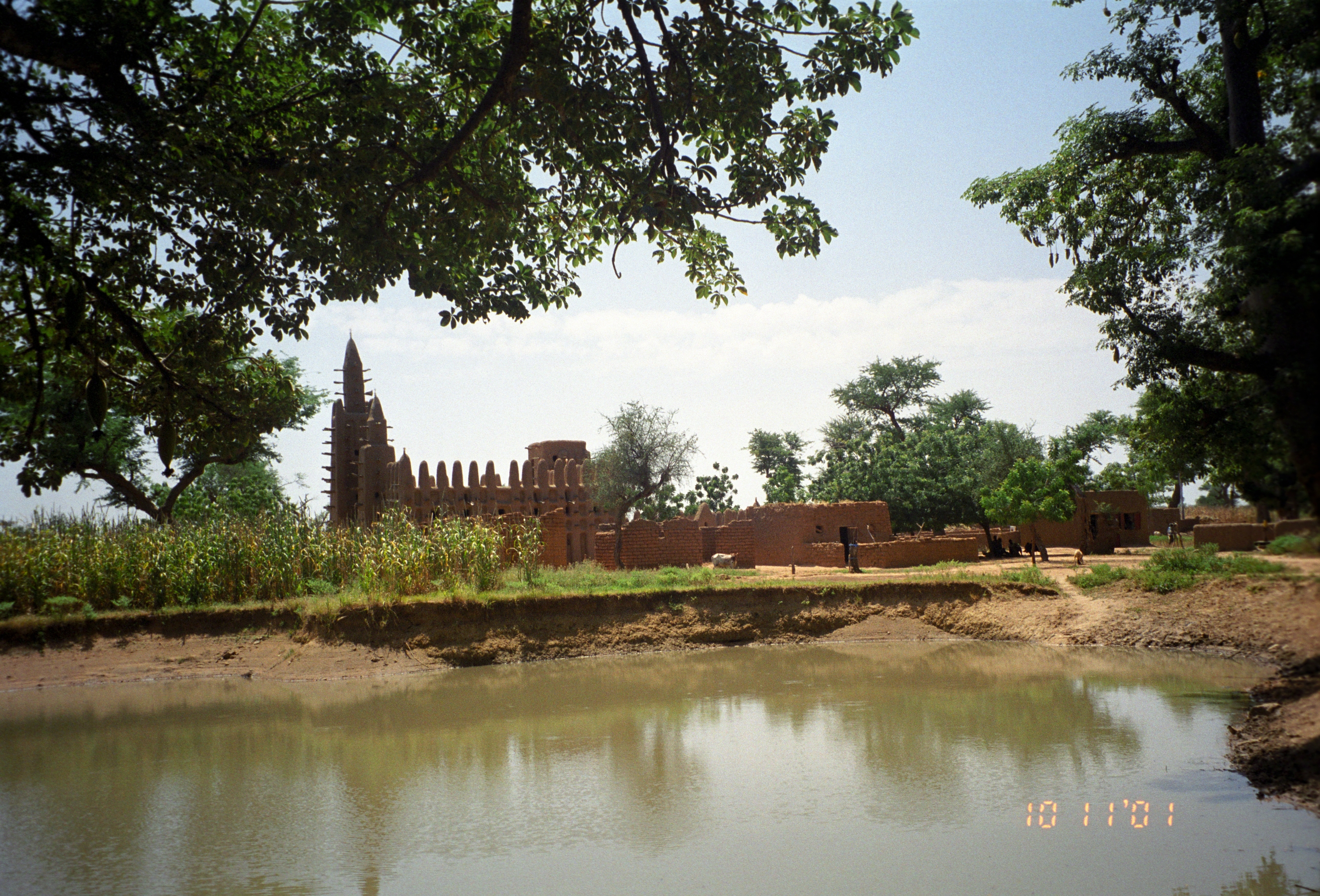 Kani-Kombole, Mali